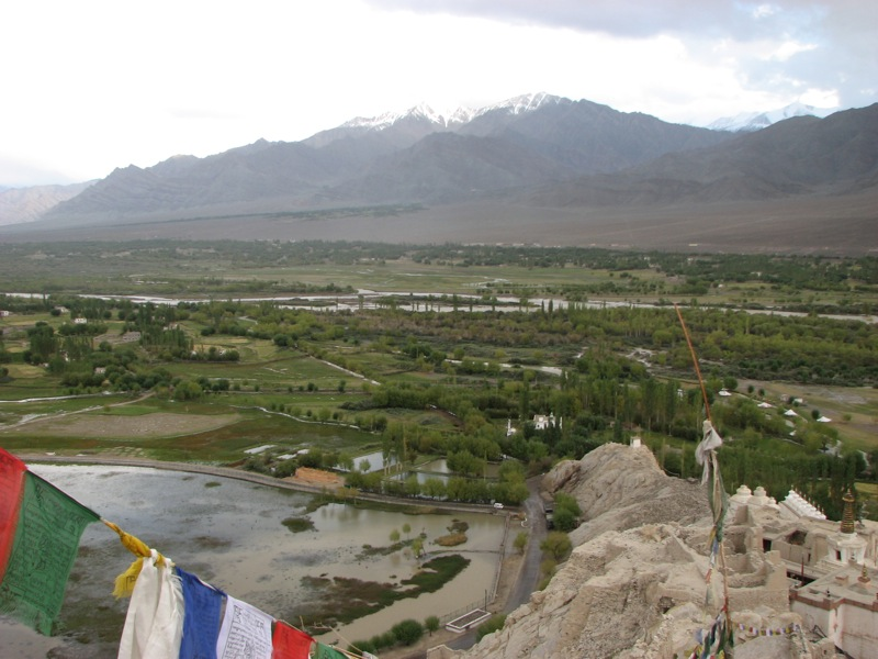 Shey Palace, Ladakh, India